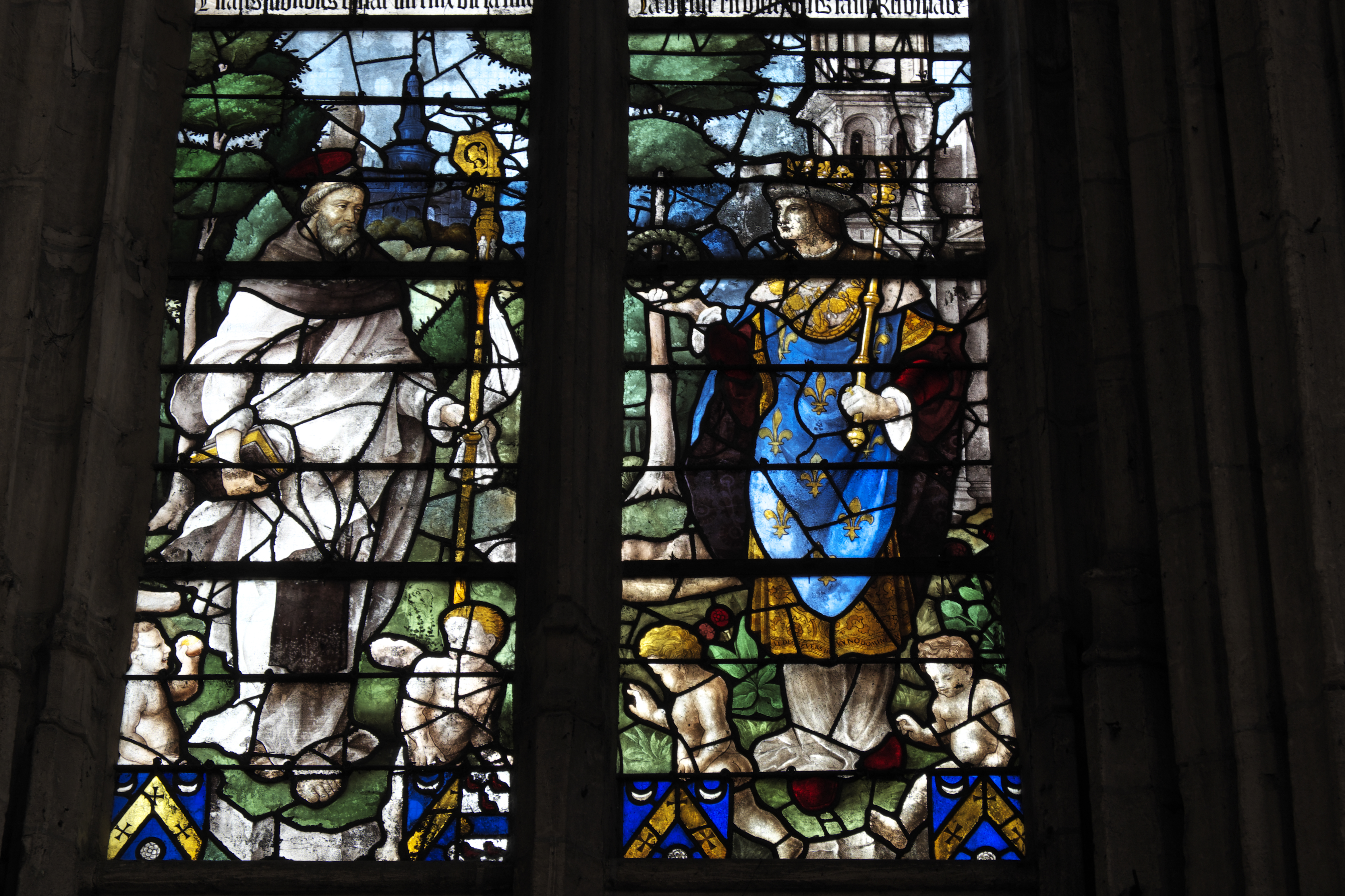 Katholische Kirche Sainte-Foy in Conches-en-Ouche im Département Eure (Haute-Normandie/Frankreich), Bleiglasfenster aus der 1. Hälfte des 16. Jahrhunderts im Chor; Darstellung: Martyrium der hl. Fides von Agen, unten: Abt und Ludwig der Heilige (Ausschnitt)